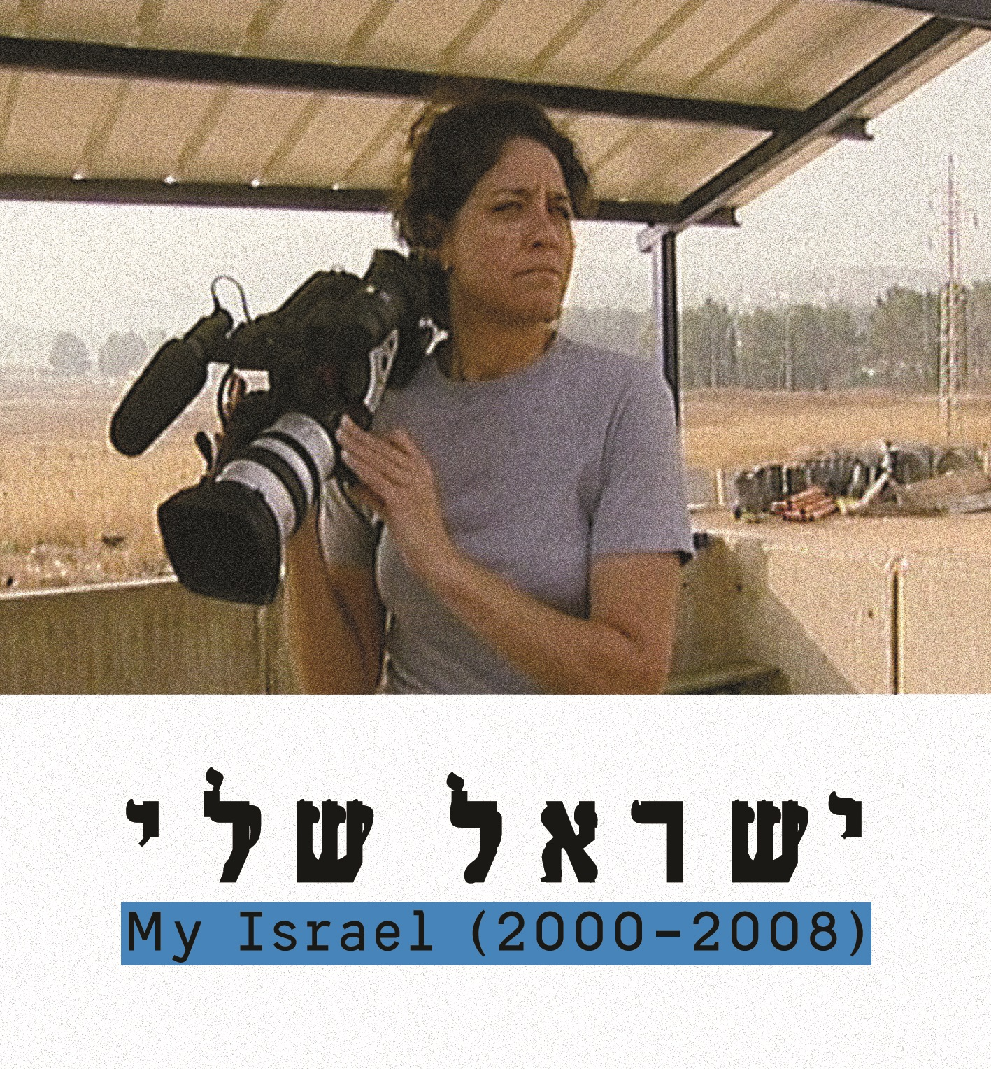 מתוך הסרט"My Israel" של יולי כהן